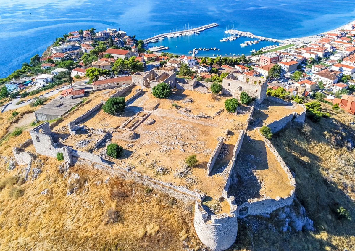 Κάστρο Παράλιου Άστρους«Κάστρο Παράλιου Άστρους»